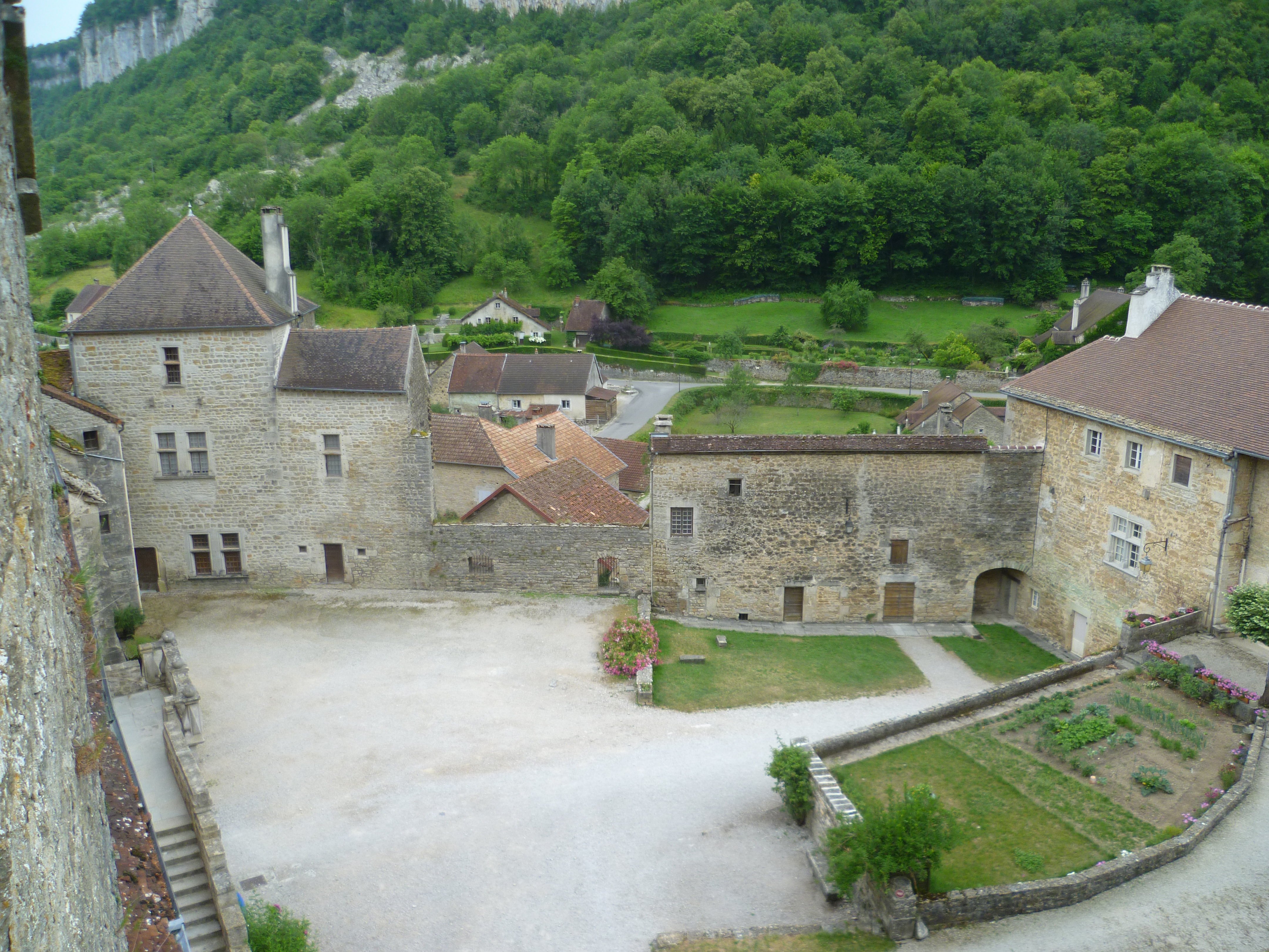 Vue de la cour abbatiale de l'abbaye de Baume-les-Messieurs